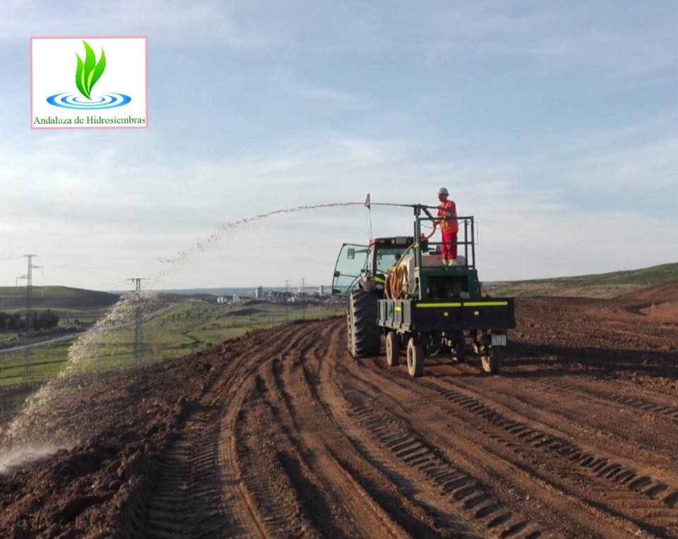 Hidrosiembra para restauración ambiental tras movimiento de tierra en obra